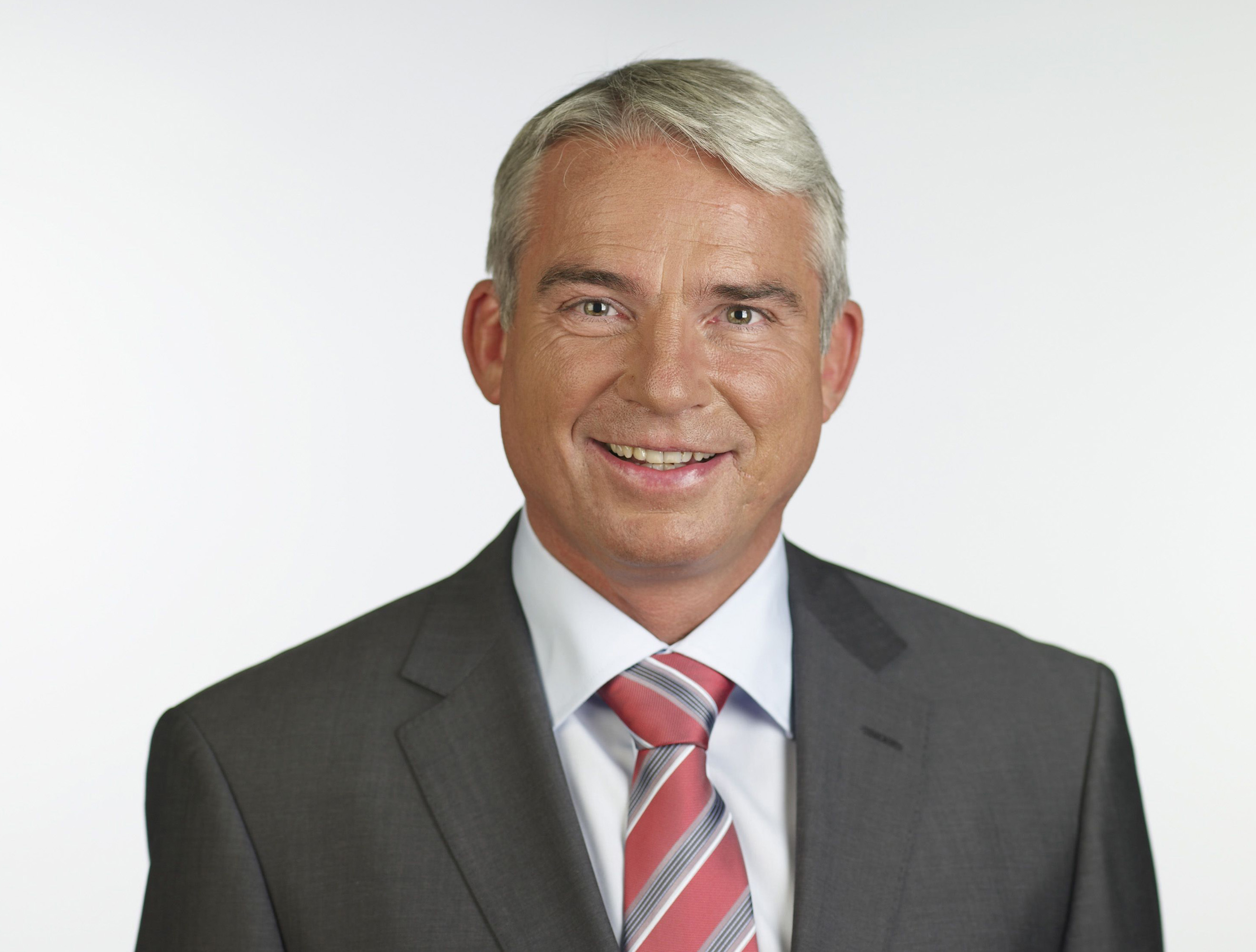 Thomas Strobl CDU Landesvorsitzender Baden-Württemberg